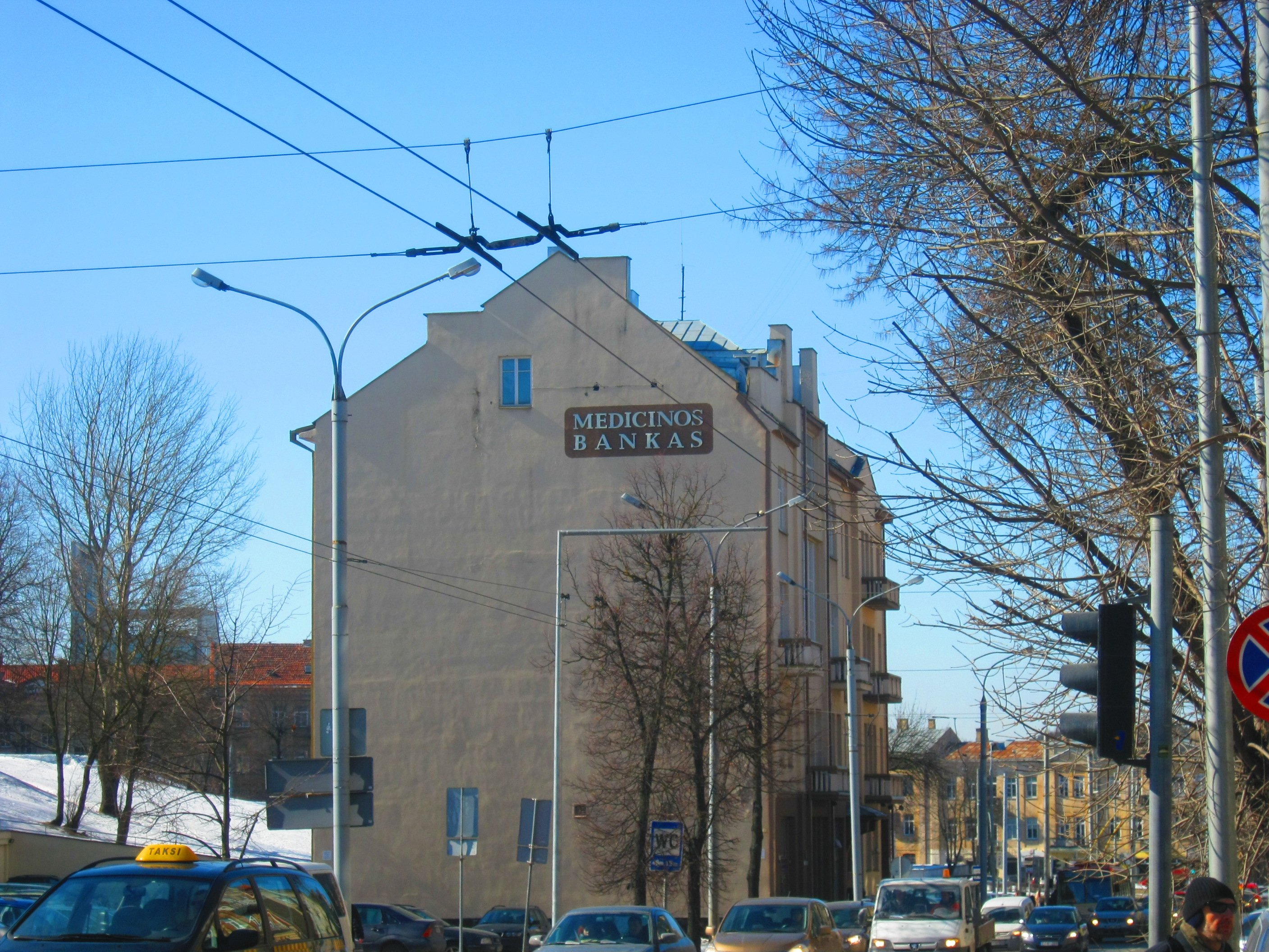 Medicinos bankas Pamėnkalnio g., Vilnius